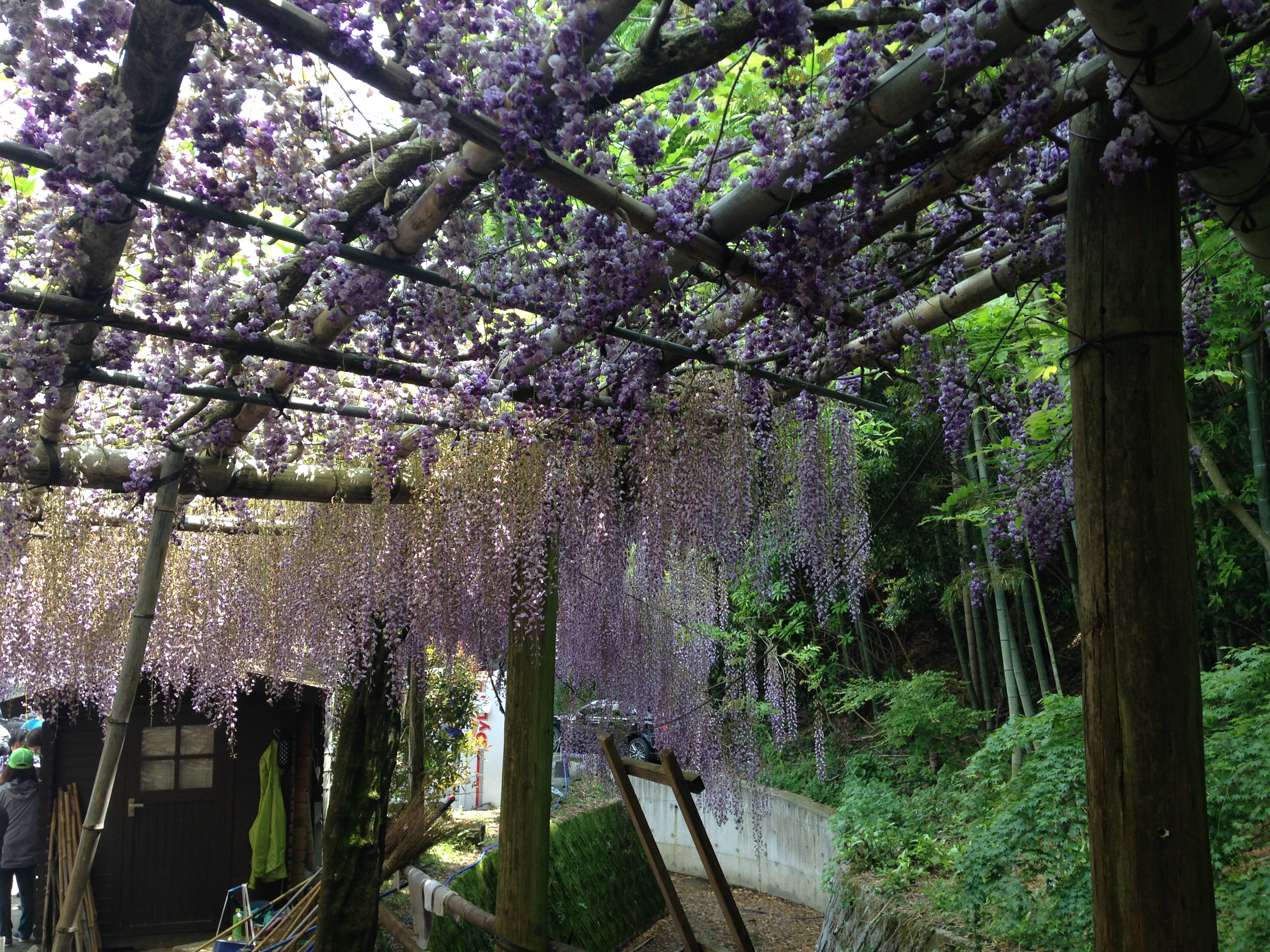 河内藤園のフジ